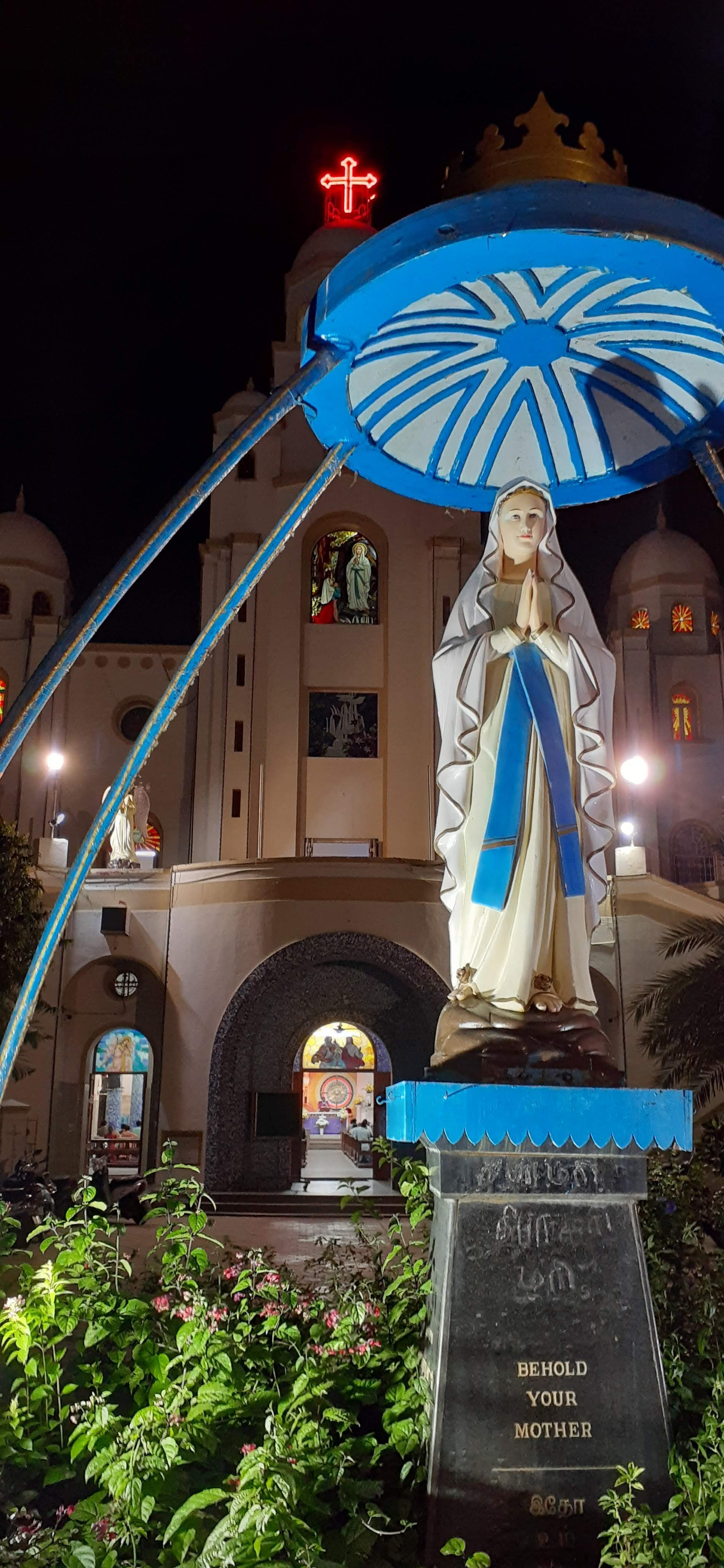 வரலாற்றுச் சிறப்புமிக்க, 'தூய லூர்து அன்னை திருத்தலம்', பெரம்பூர், சென்னை, தமிழ்நாடு, இந்தியா.